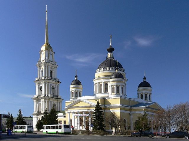 Спасо-Преображенский собор (Ярославская область, Рыбинск, Соборная площадь)